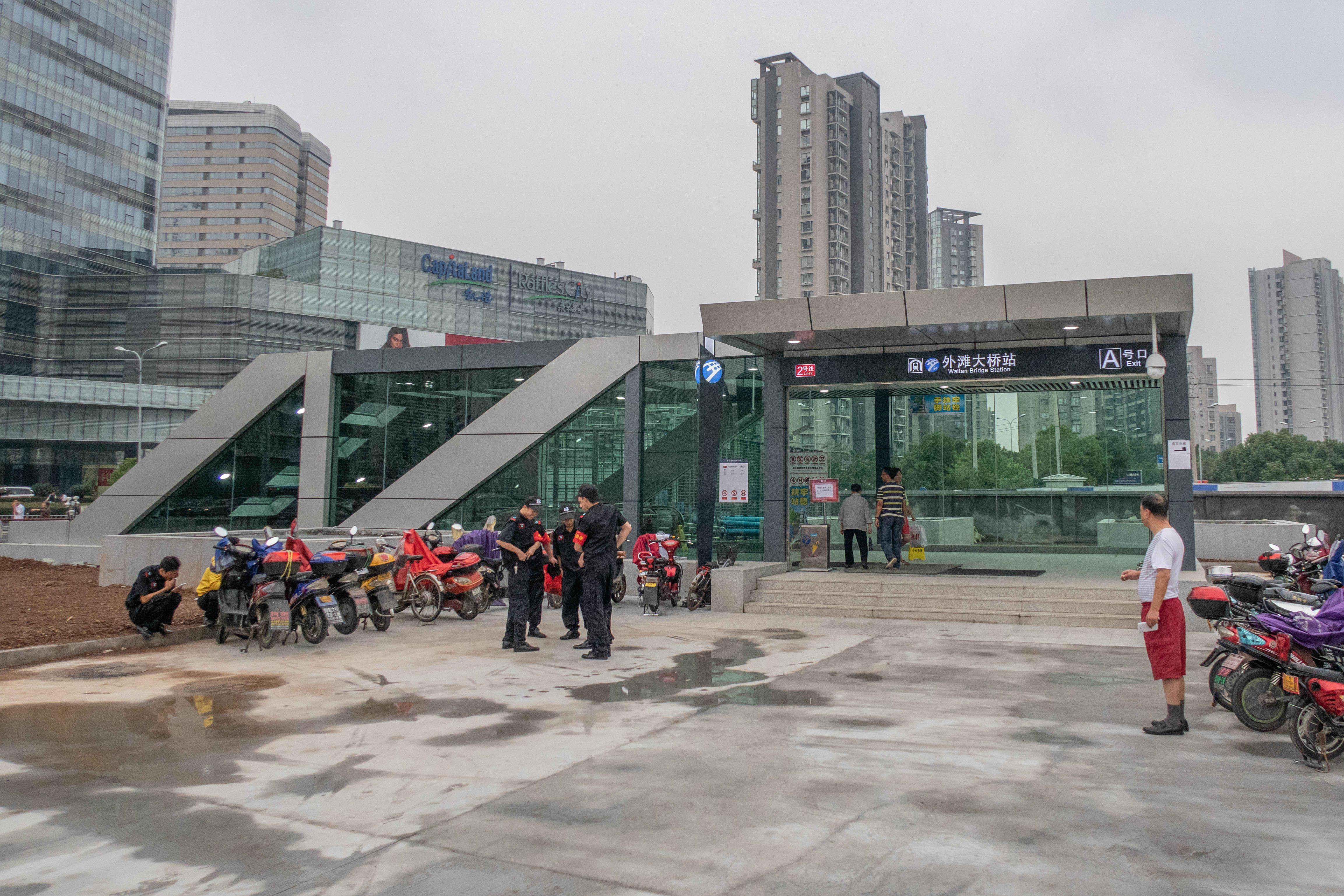 宁波轨道交通2号线外滩大桥站